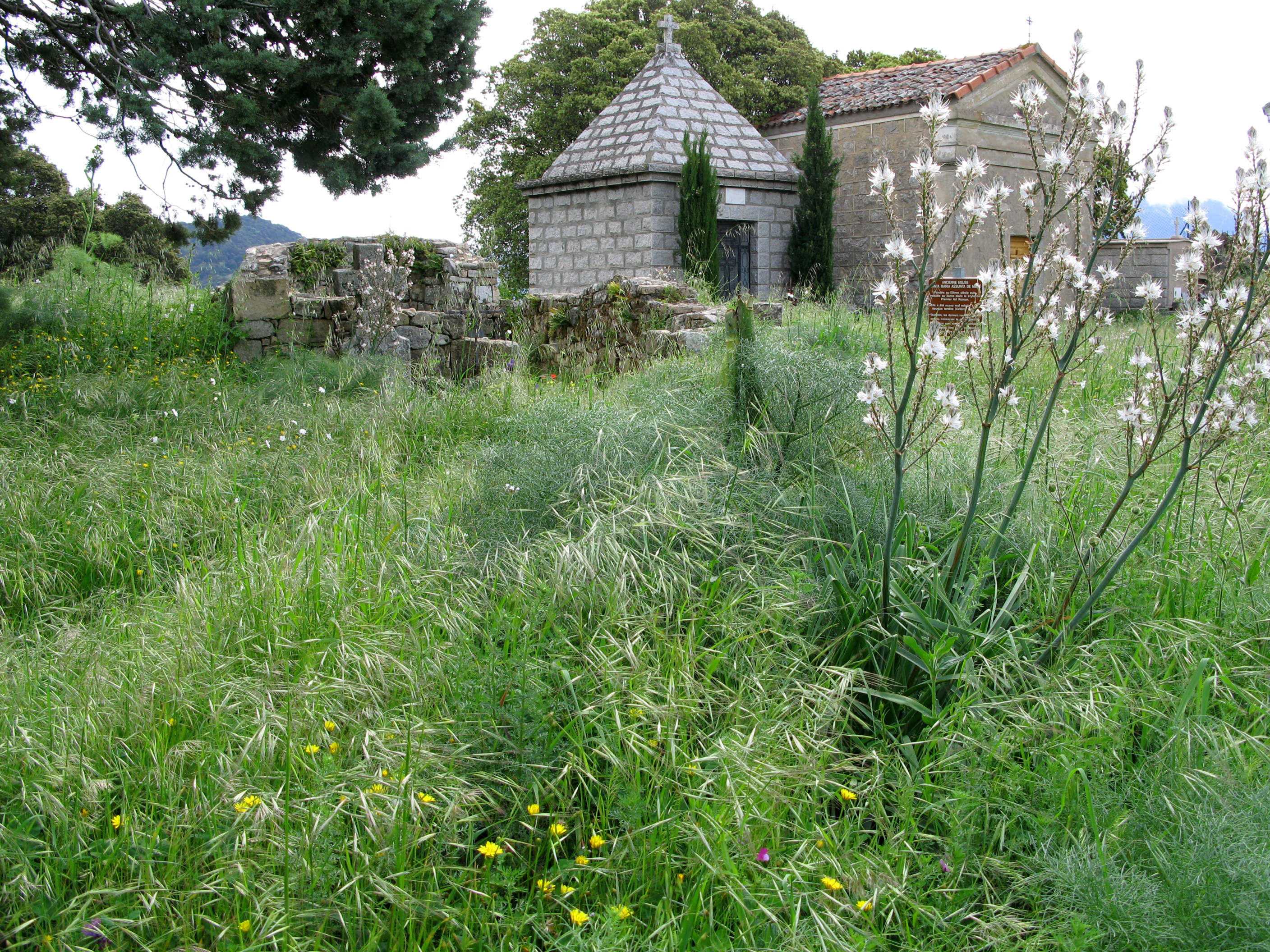 Mela (Corse-du-Sud, France) - Vestiges de l'église Santa-Maria-Assunta, dans le petit cimetière en léger contrebas de la route. L'église était petite. On distingue ses murs à gauche, parmi les herbes. Les 2 édifices (plus à droite et un peu plus au fond) sont des tombes et sont sans rapport avec l'église. Un panneau brun-rouge présente brièvement le site. On l'aperçoit ici entre les tiges de la haute fleur (ou herbe) du premier plan.